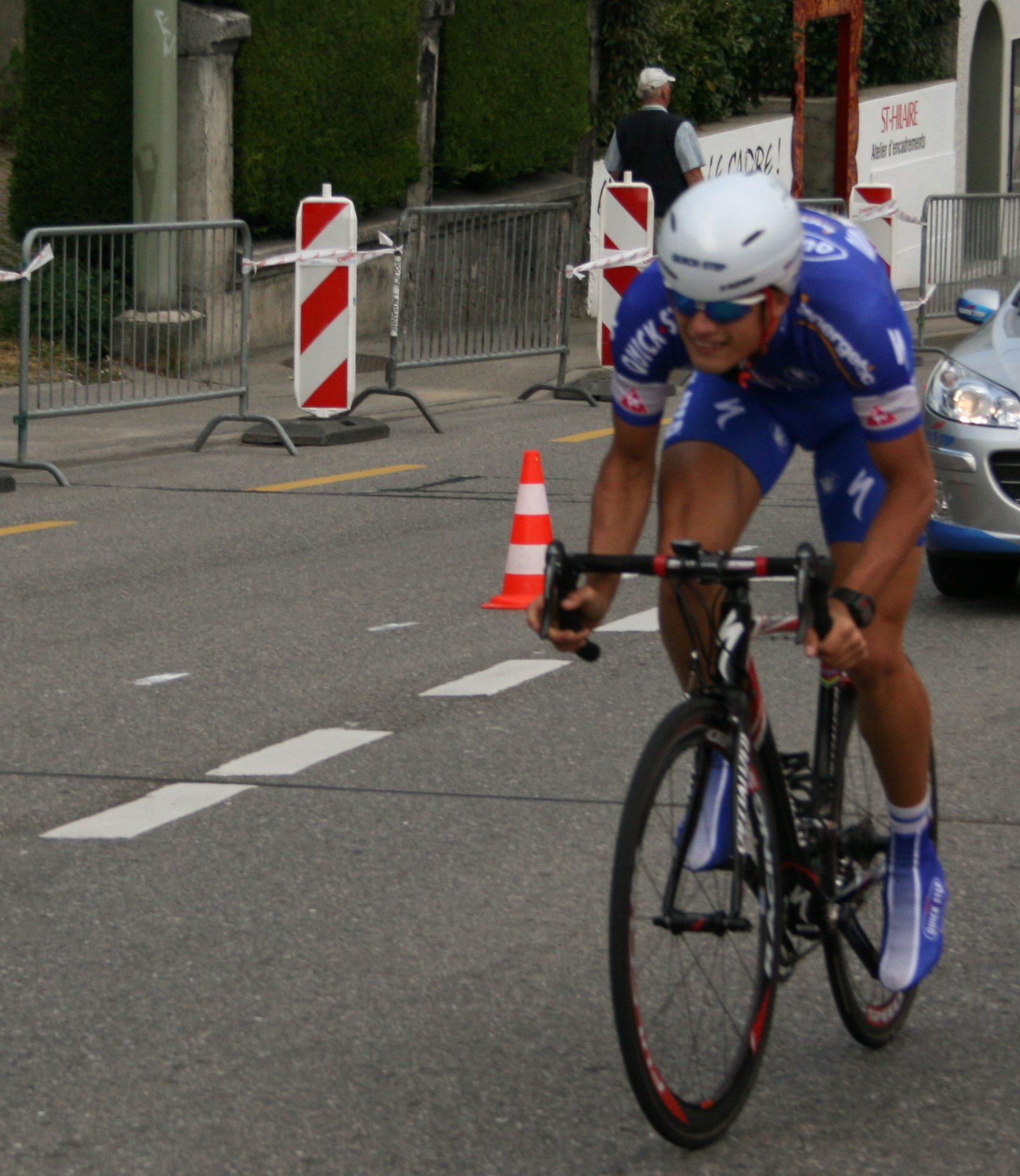 Davide Vigano prologue du Tour de Romandie 2007